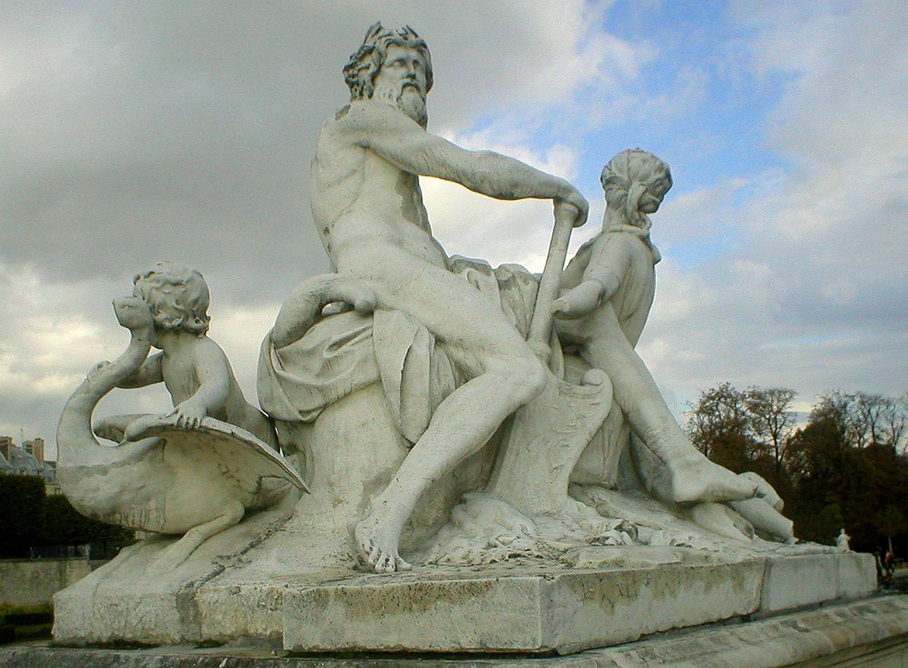 La Seine et la Marne (1712) par Nicolas Coustou, moulage au jardin des Tuileries (l'original est au Louvre).